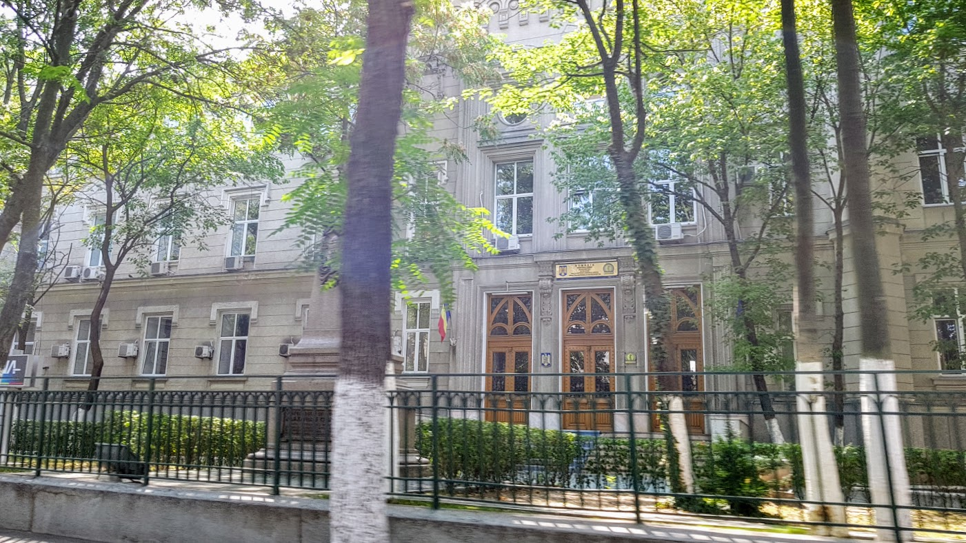 Sediul DNA (Direcția Națională Anticorupție), strada Știrbei Vodă, București.